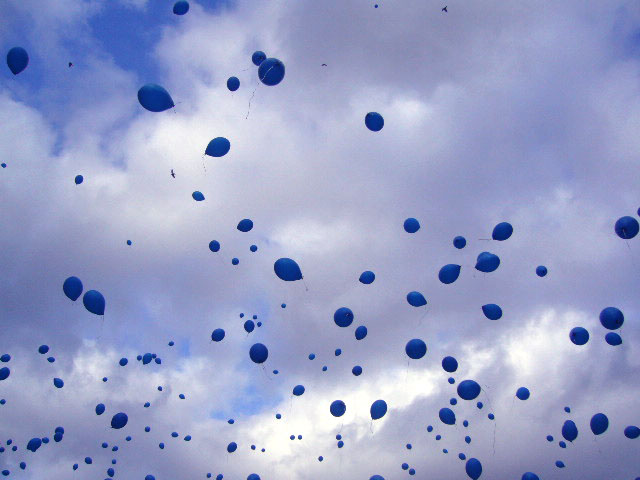 Reconstitution du lâcher de 1001 ballons bleus, qualifié ultérieurement de sculpture aérostatique par Yves Klein et par lequel cet artiste avait, en mai 1957, annoncé le vernissage à la Galerie Iris Clert, inaugurant son époque bleue. Cette reconstitution, mise en scène en 2007 sur la Place Georges-Pompidou (Piazza Beaubourg) à l'occasion de la clôture d'une exposition consacrée à Yves Klein (2006-2007) par le Musée national d'Art Moderne, célebrait le cinquantenaire de l'évenement.